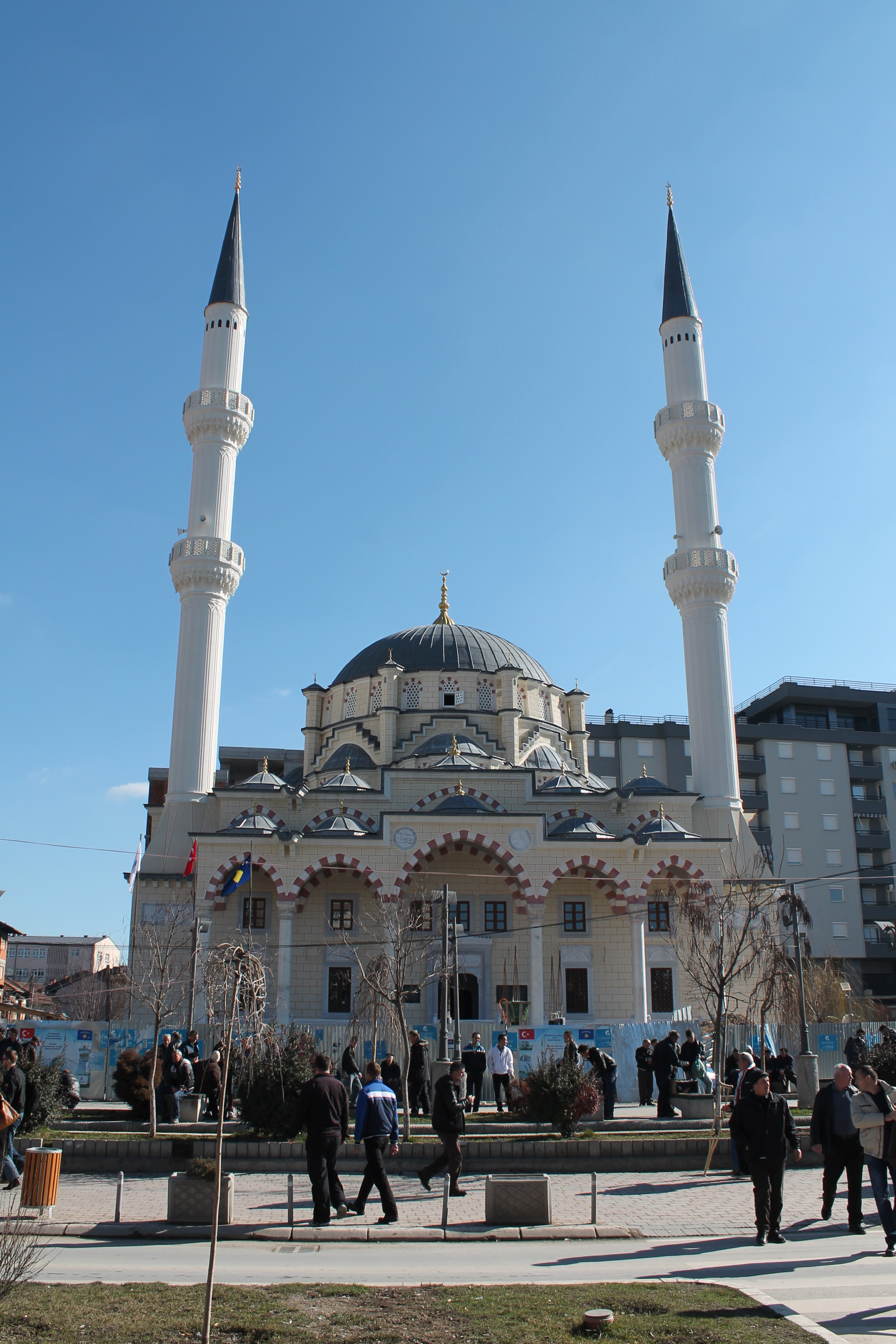 Xhamia e Mitrovicës